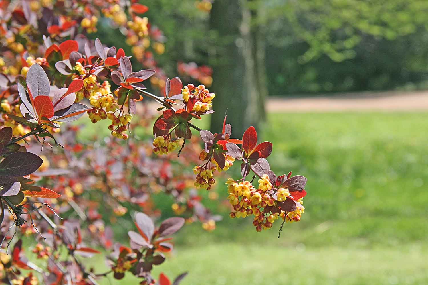 Berberis thunbergii var. Atropurpurea autor:Prazak